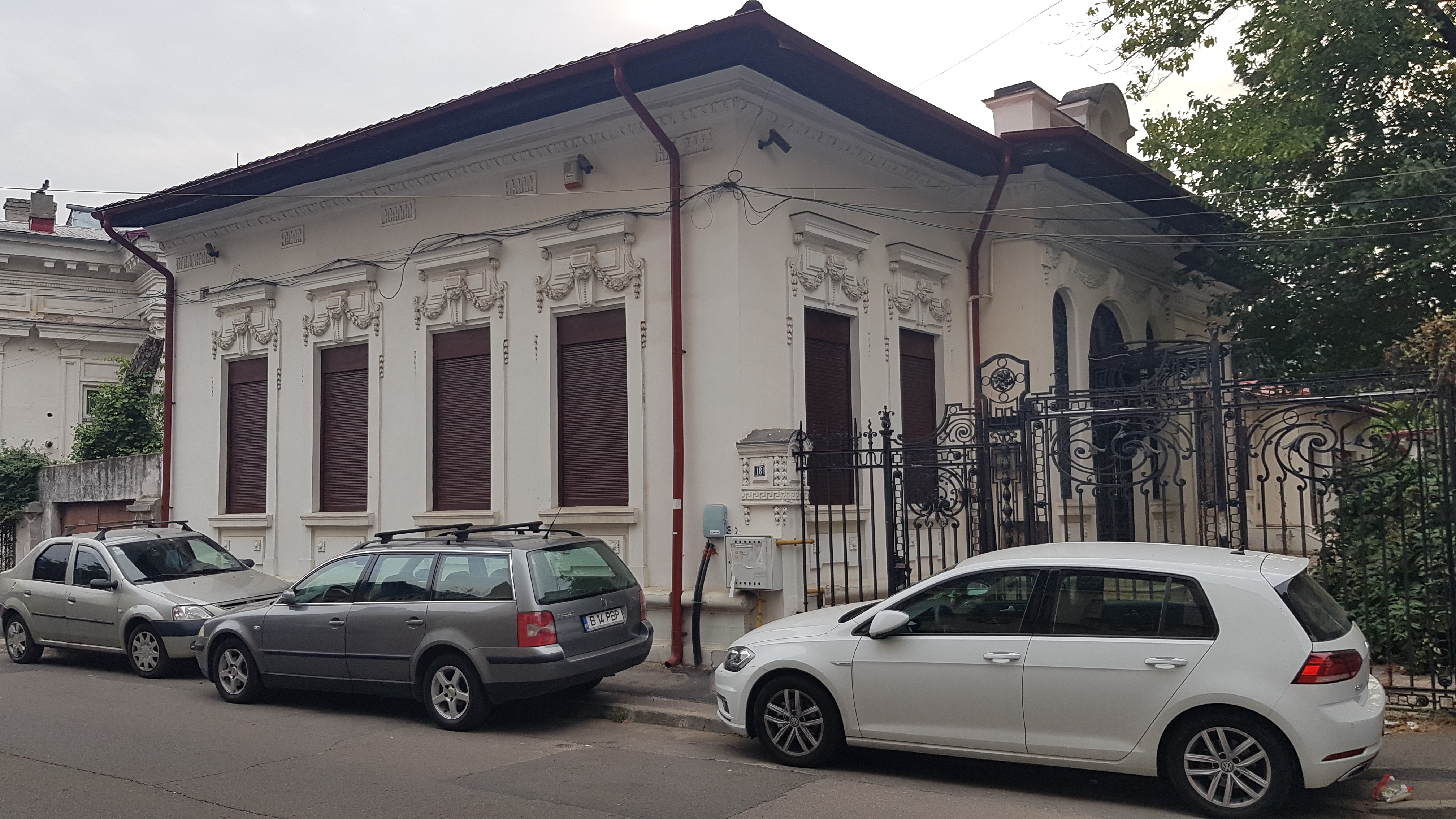 Casă, monument istoric